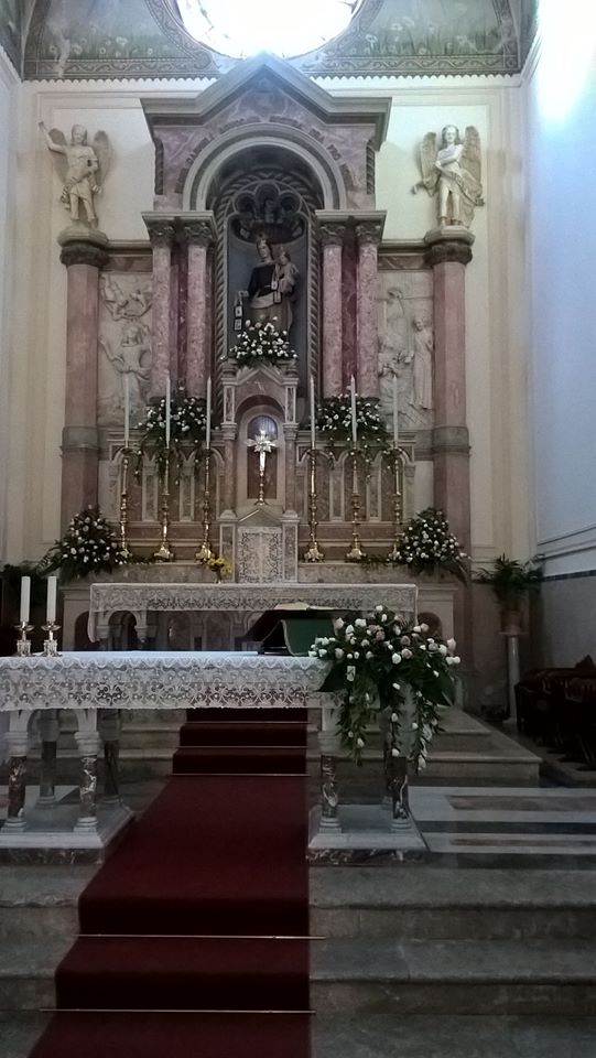 Altare Maggiore Santuario S.M.del Carmelo